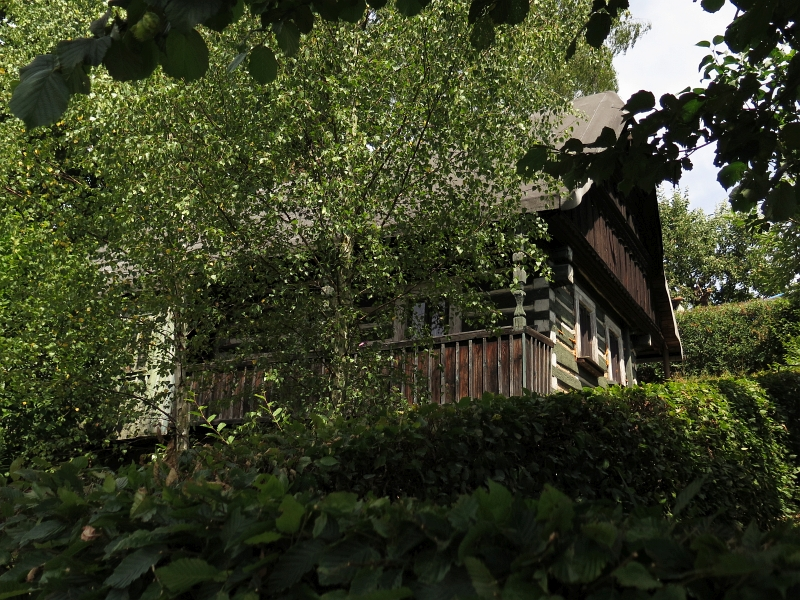 Usedlost čp. 45, Bořkov 45, Bořkov.